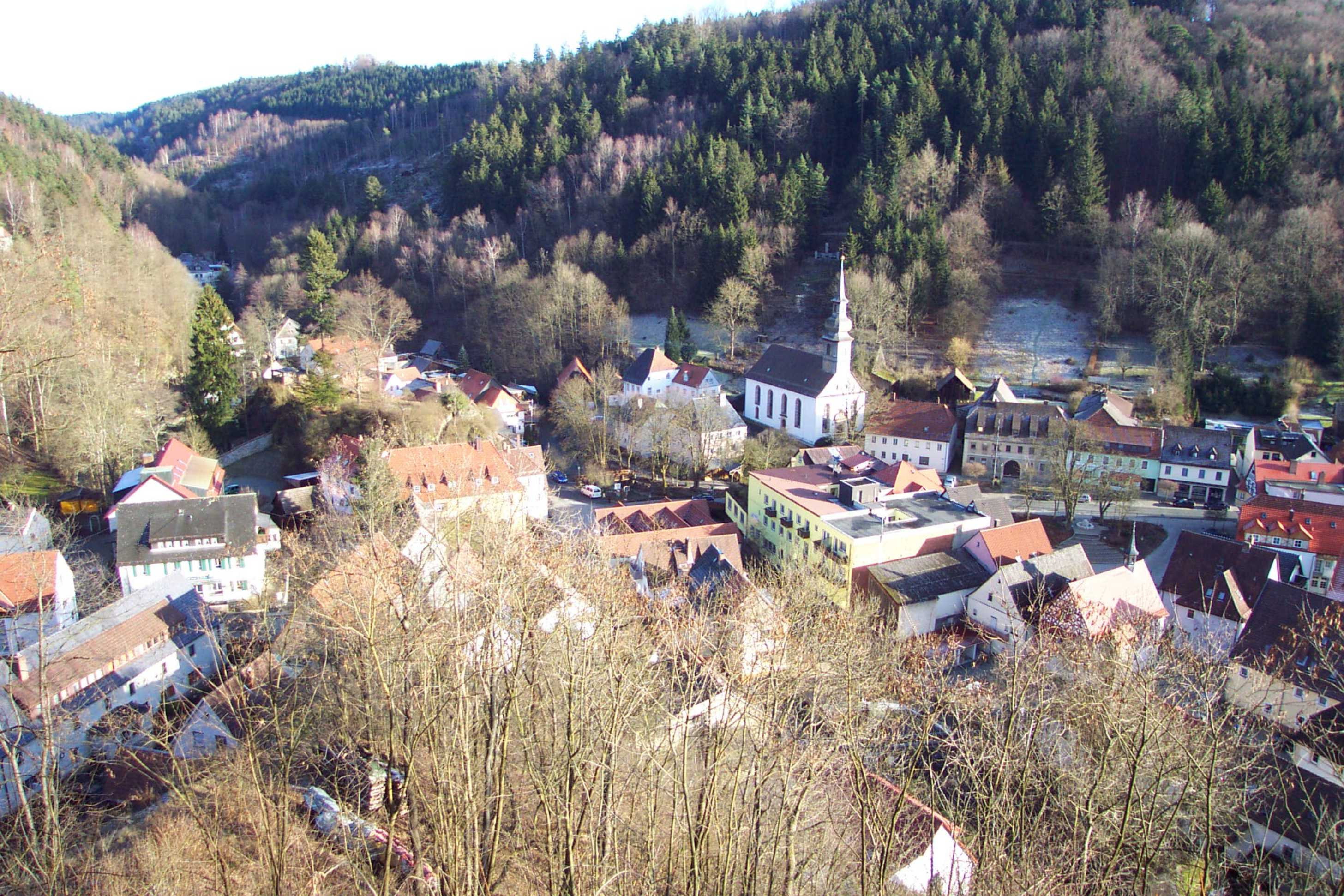 Blick vom Kaiserdenkmal auf Wirsberg